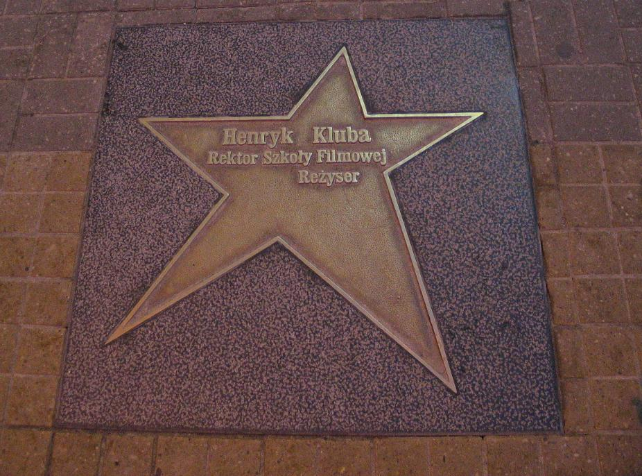 Łódź Walk of Fame - Henryk Kluba